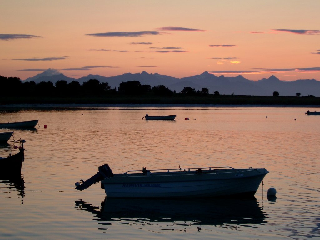 Lofoten-Mitternacht